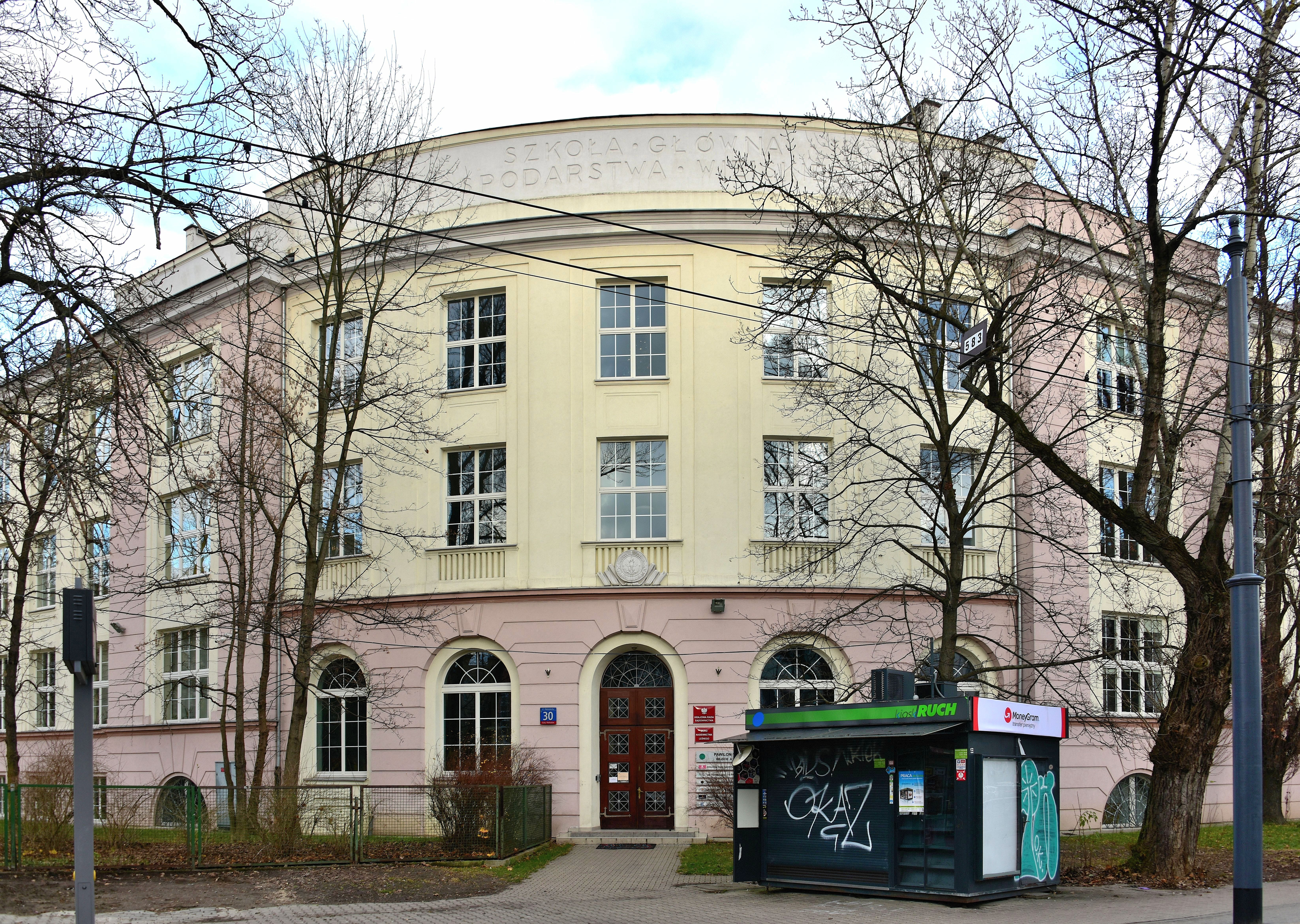 Budynek SSGW przy ul. Rakowieckiej 30 w Warszawie